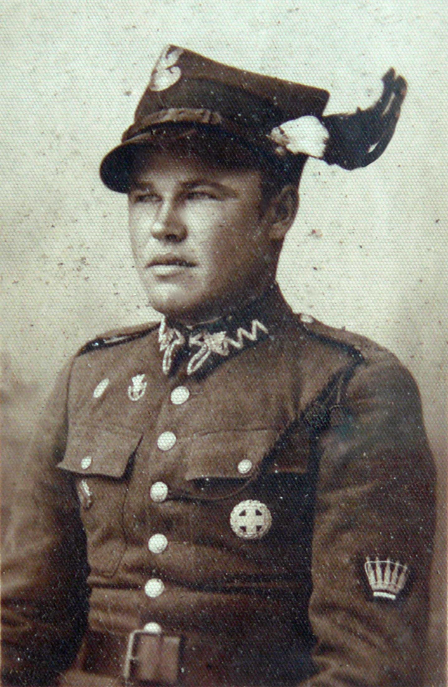 Władysław Bienias w mundurze 53 Pułku Piechoty Strzelców Kresowych